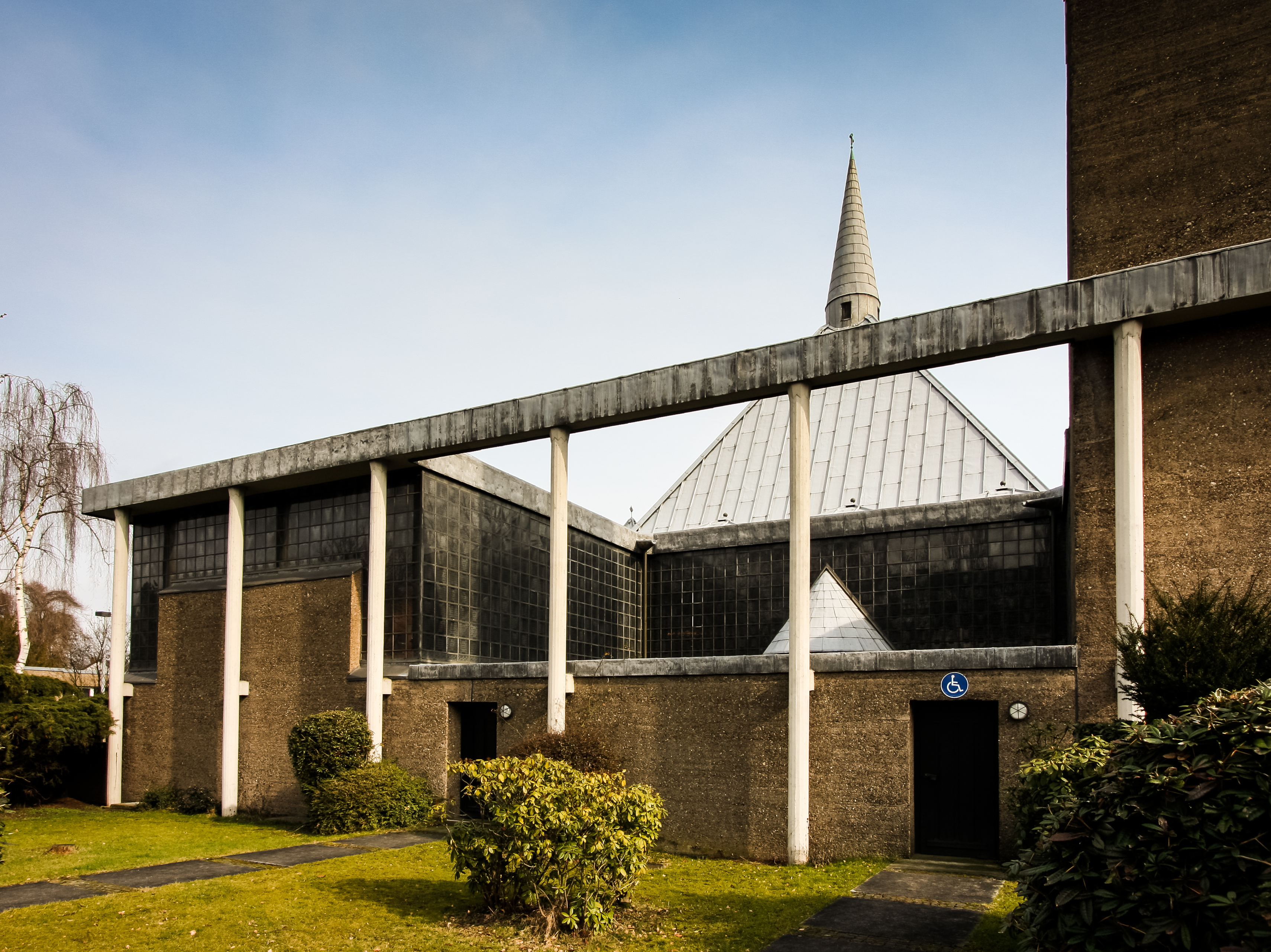 St. Fronleichnam in Köln Porz, Architekt: Gottfried Böhm